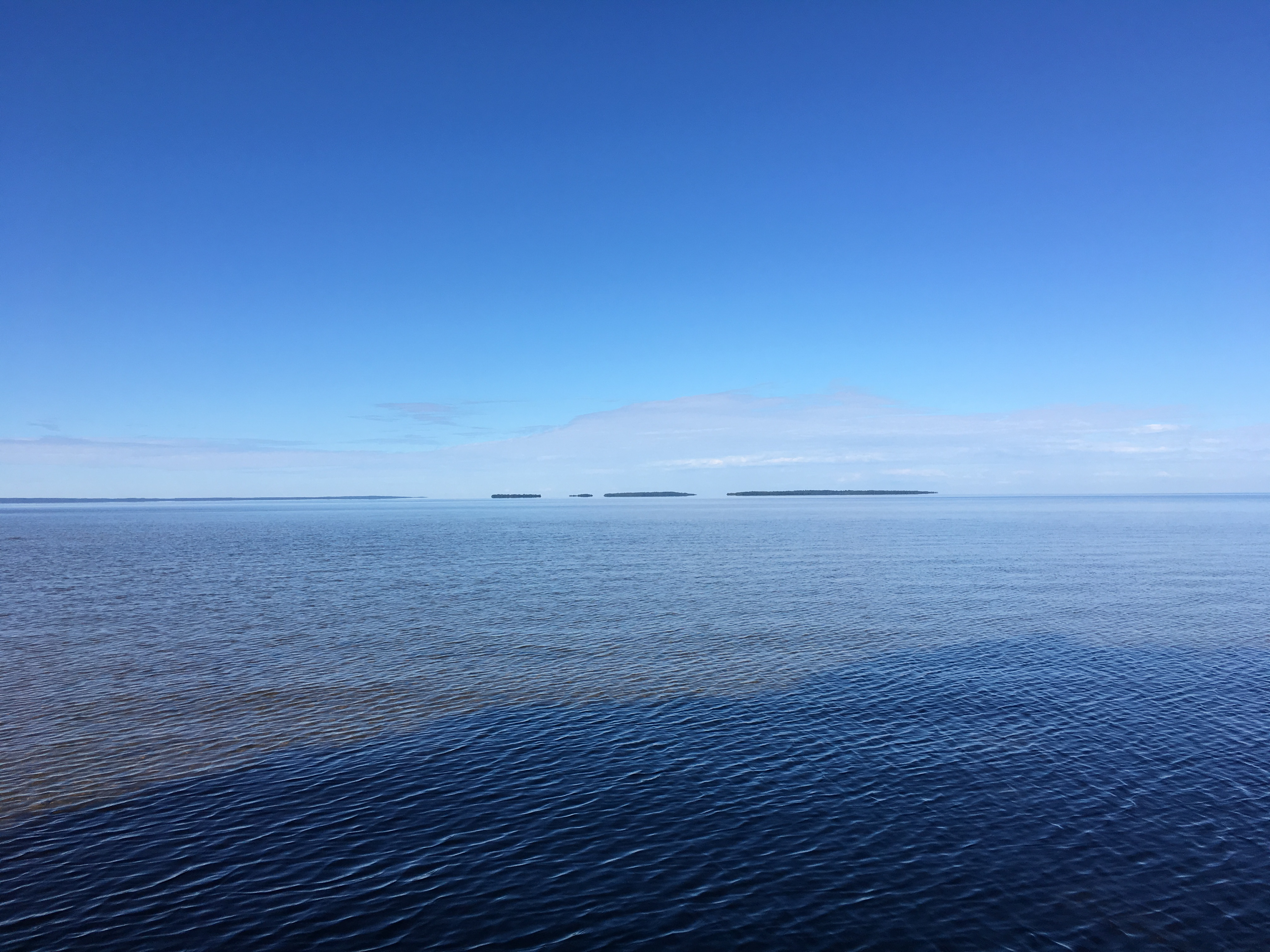 Les îles sont accessibles par bateau depuis North Bay